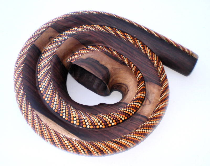 Spiral didgeridoo